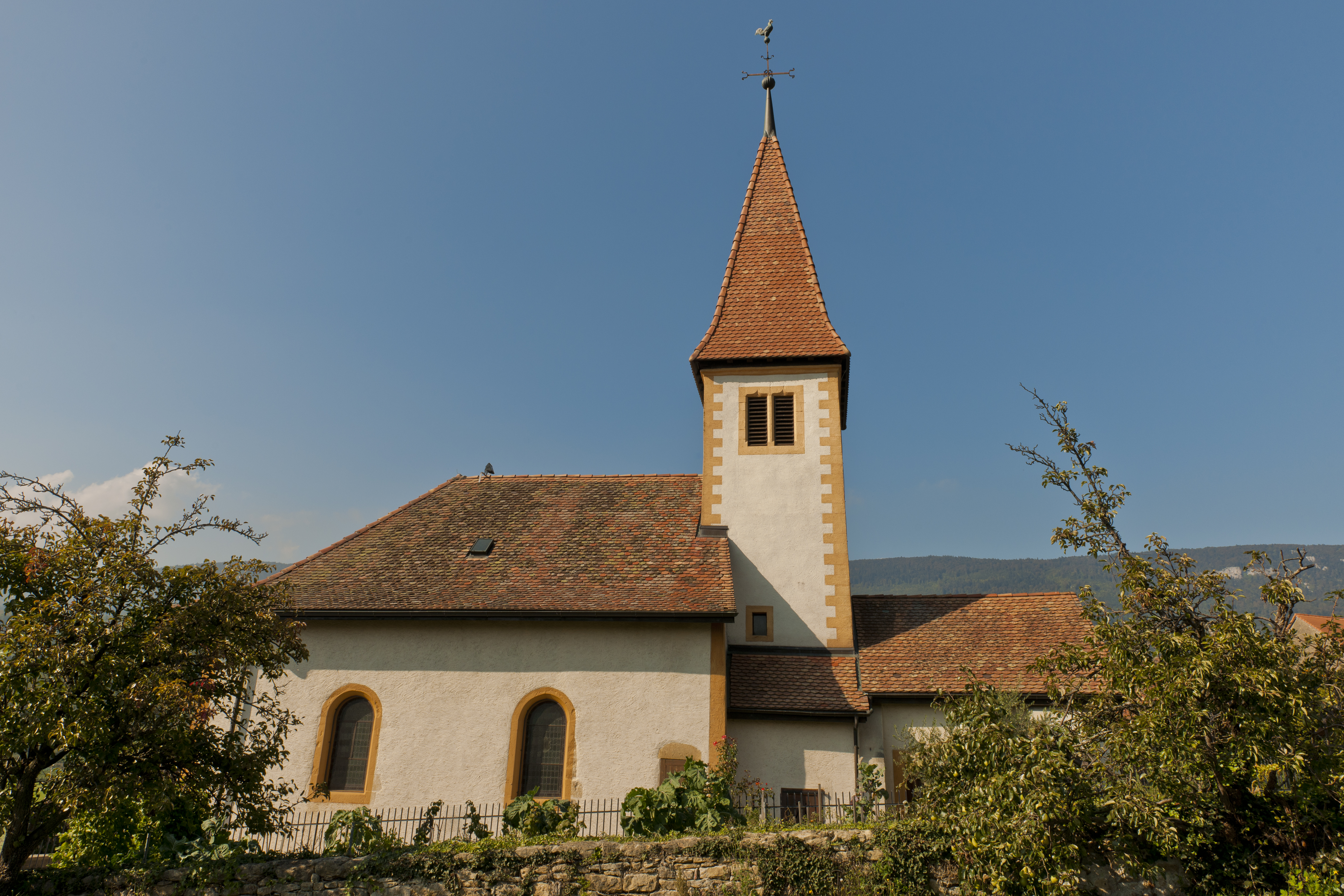 Onnens, Eglise réformée St-Martin